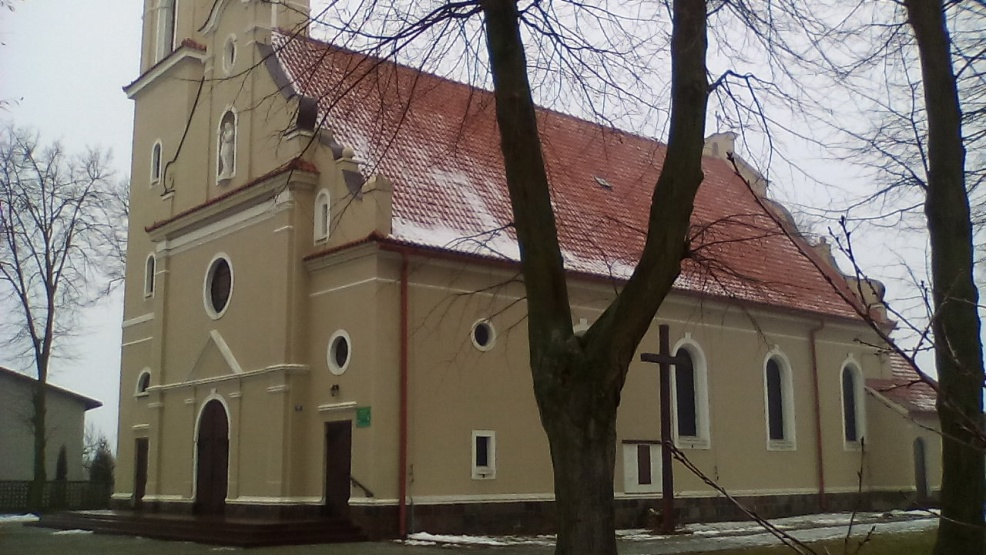 Zabytek